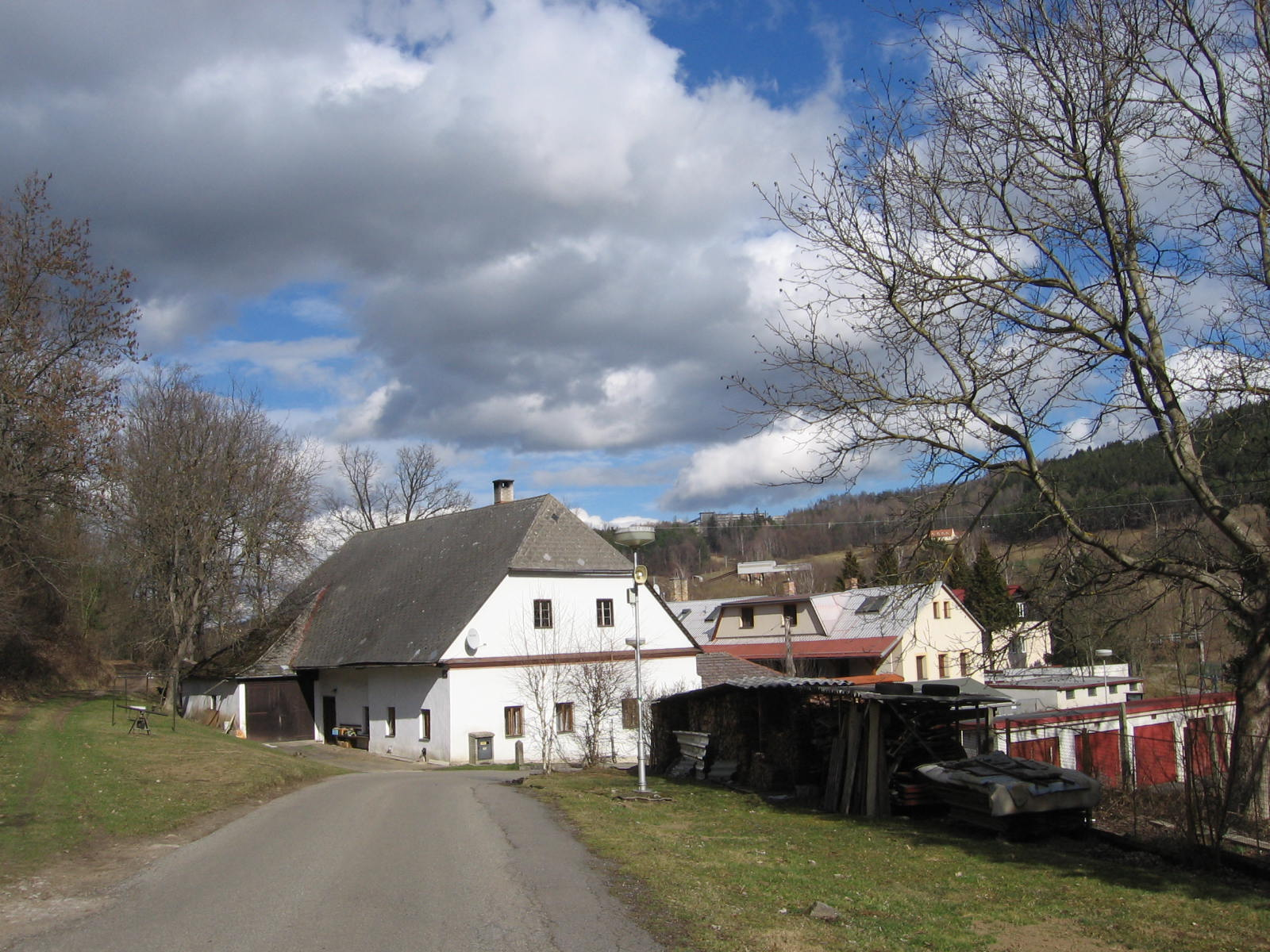 Mlýnská (Prachatice)